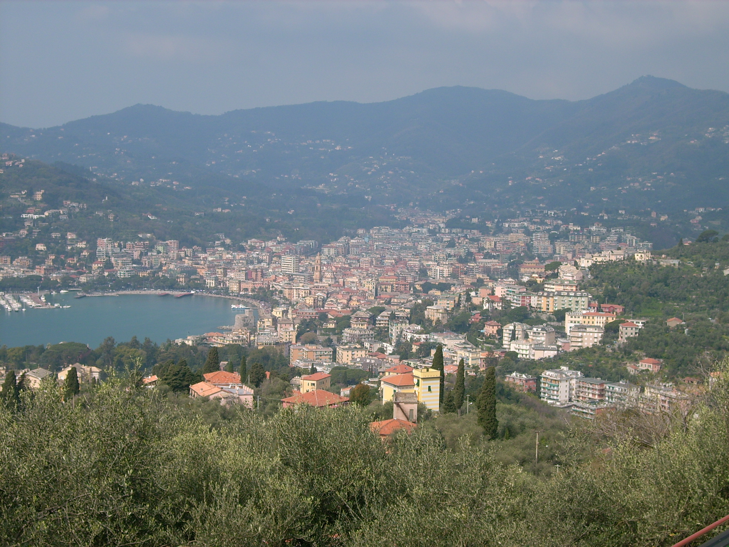 Panorama di Rapallo